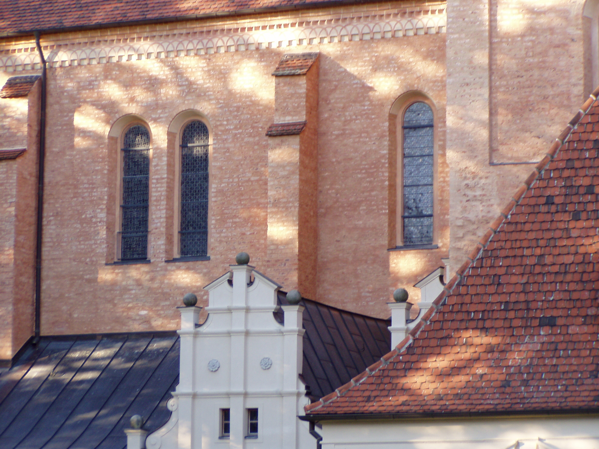 Mauerwerk der sanierten Klosterkirche Doberlug im Reformationstil auf dem Schlossgelände in Doberlug-Kirchhain. Das danebenliegende Schloss hat 4 Flügel.